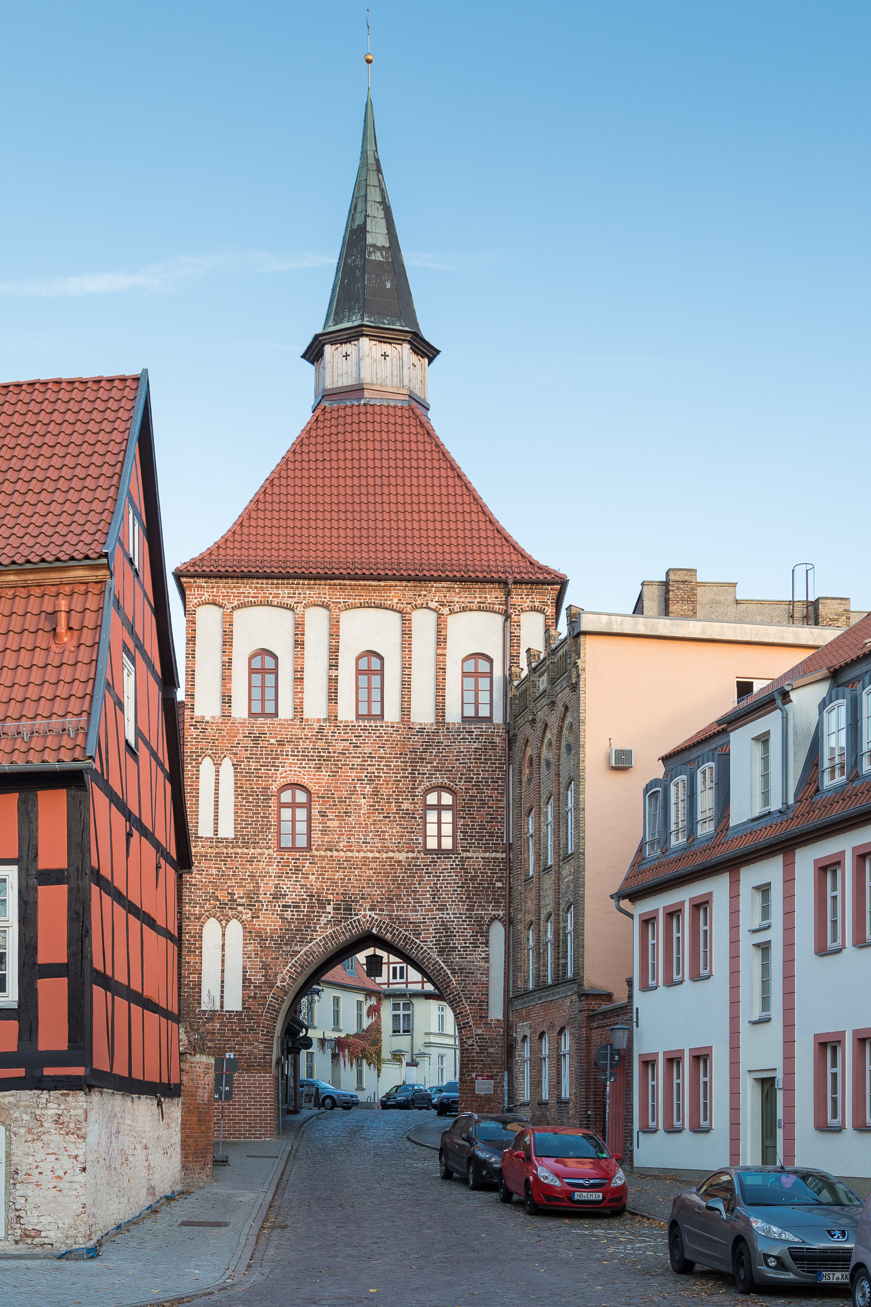 Stadteingang Kütertor